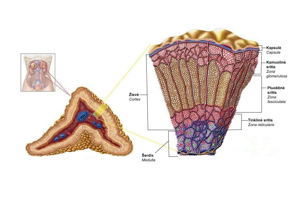 Antinksčio skersinis pjūvis ir mikroskopinis vaizdas